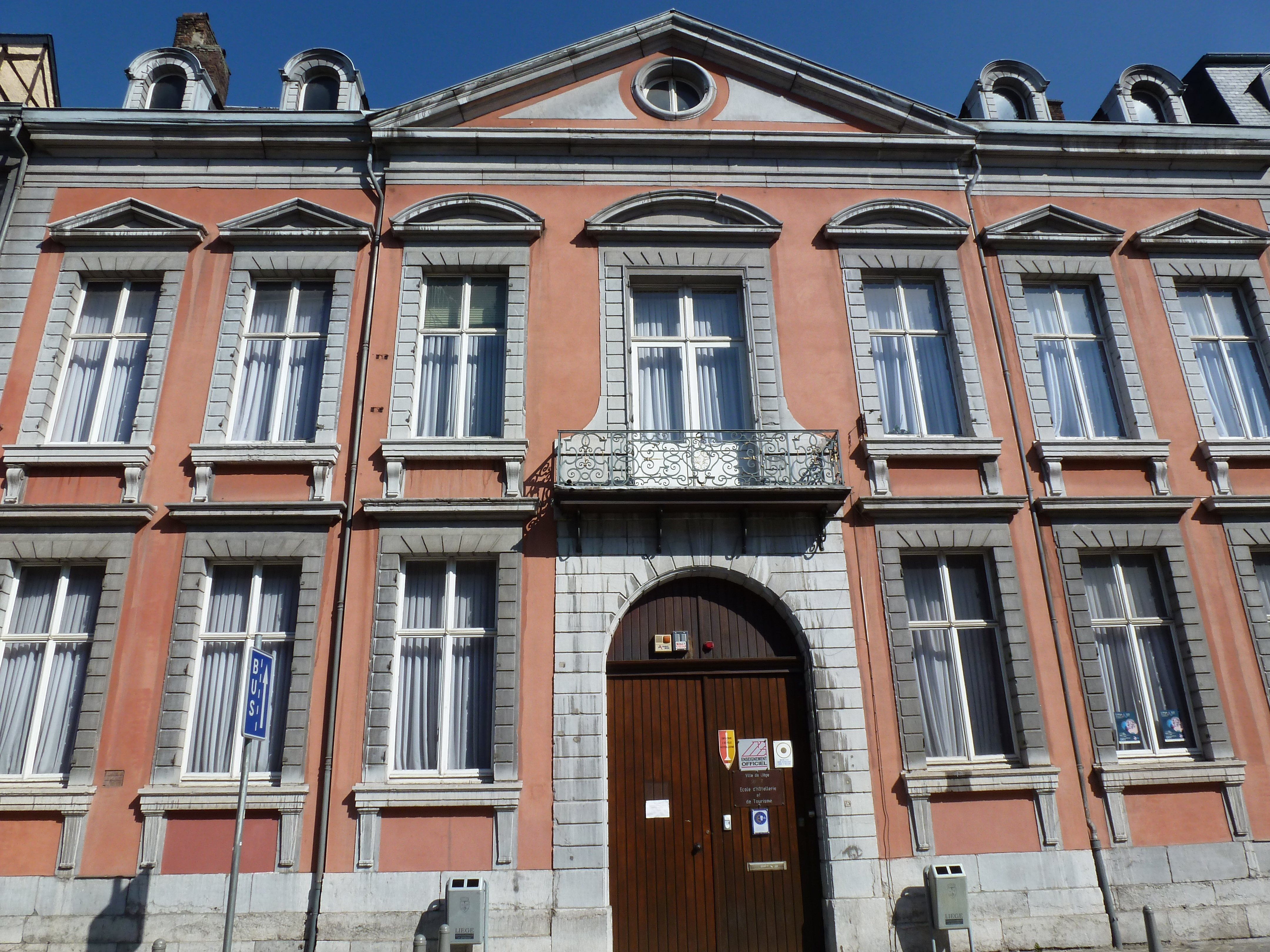 ancien Hôtel de Stockem de Heers - devenu Ecole d'Hôtellerie